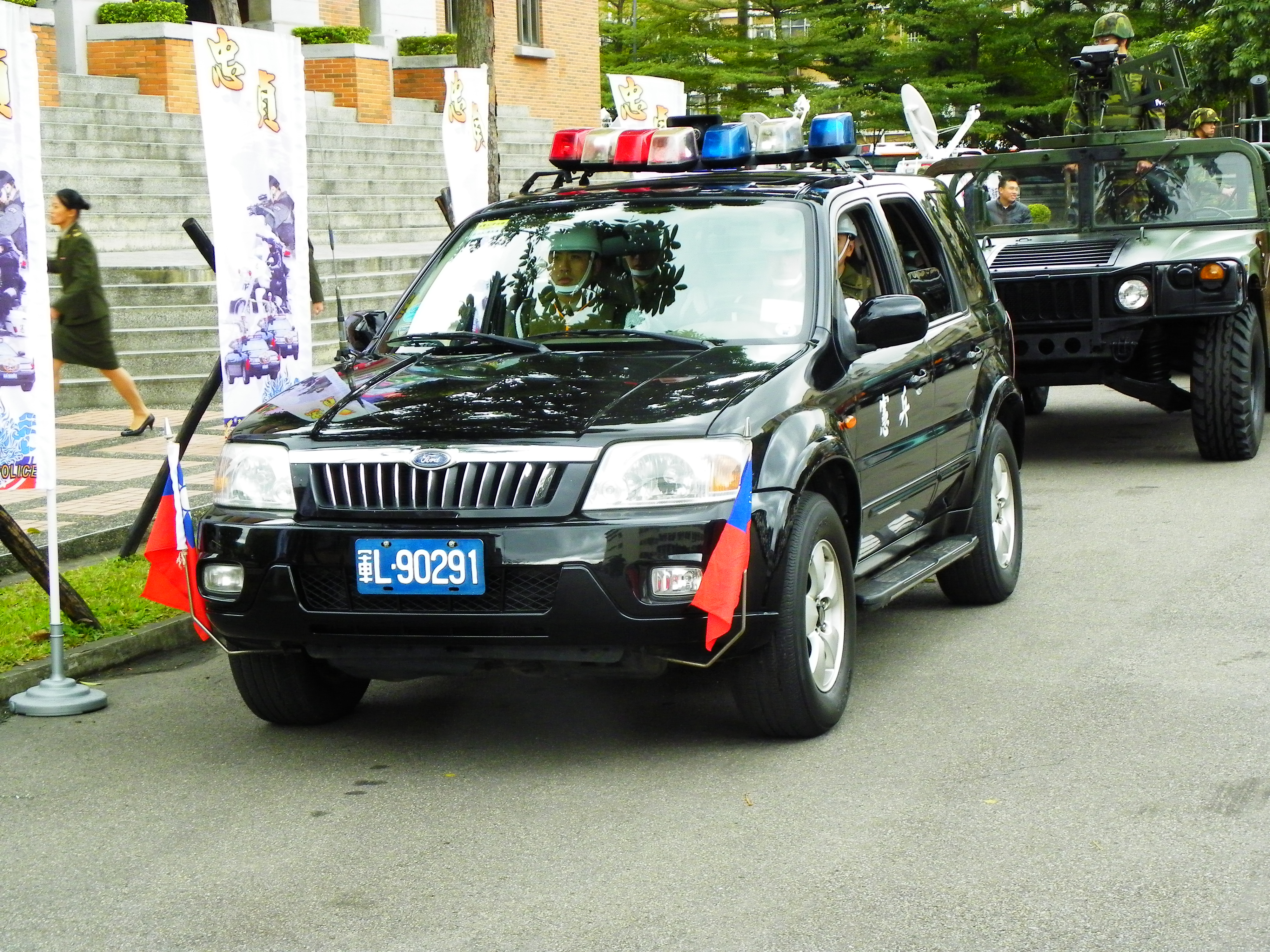 2011年憲兵紀念日分列式開始前，停放司令部中正堂外的Ford Escape警備車。